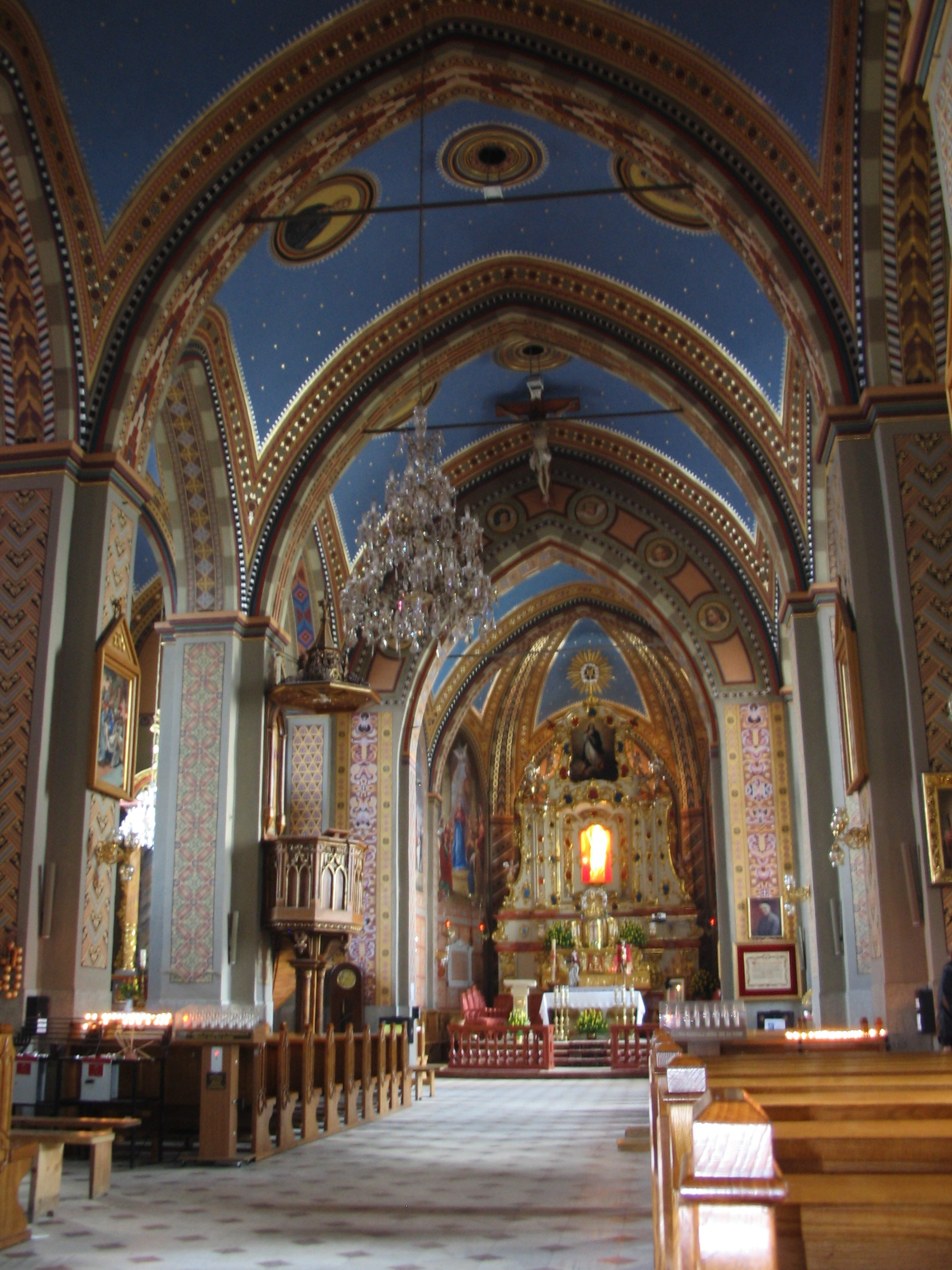 Ludźmierz - sanktuarium maryjne